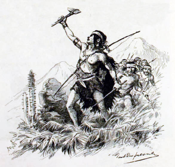 Lautaro. Dibujo publicado en Revista Zig-Zag